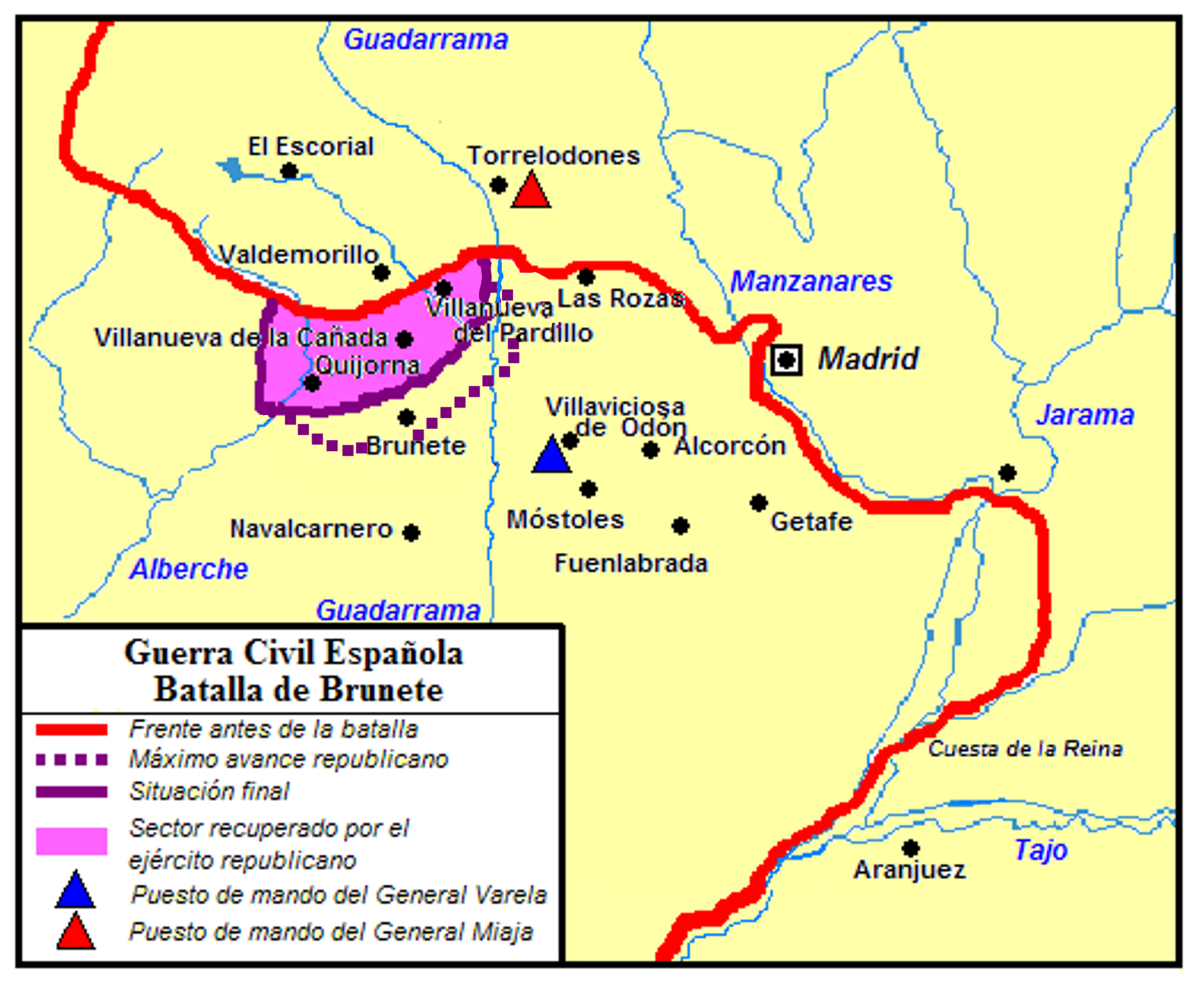 Mapa de la zona donde se desarrolló la Batalla de Brunete. Se indica la línea de máxima penetración de las fuerzas republicanas y la situación final, correspondiente al día 27 de julio, cuando queda estabilizado el frente.